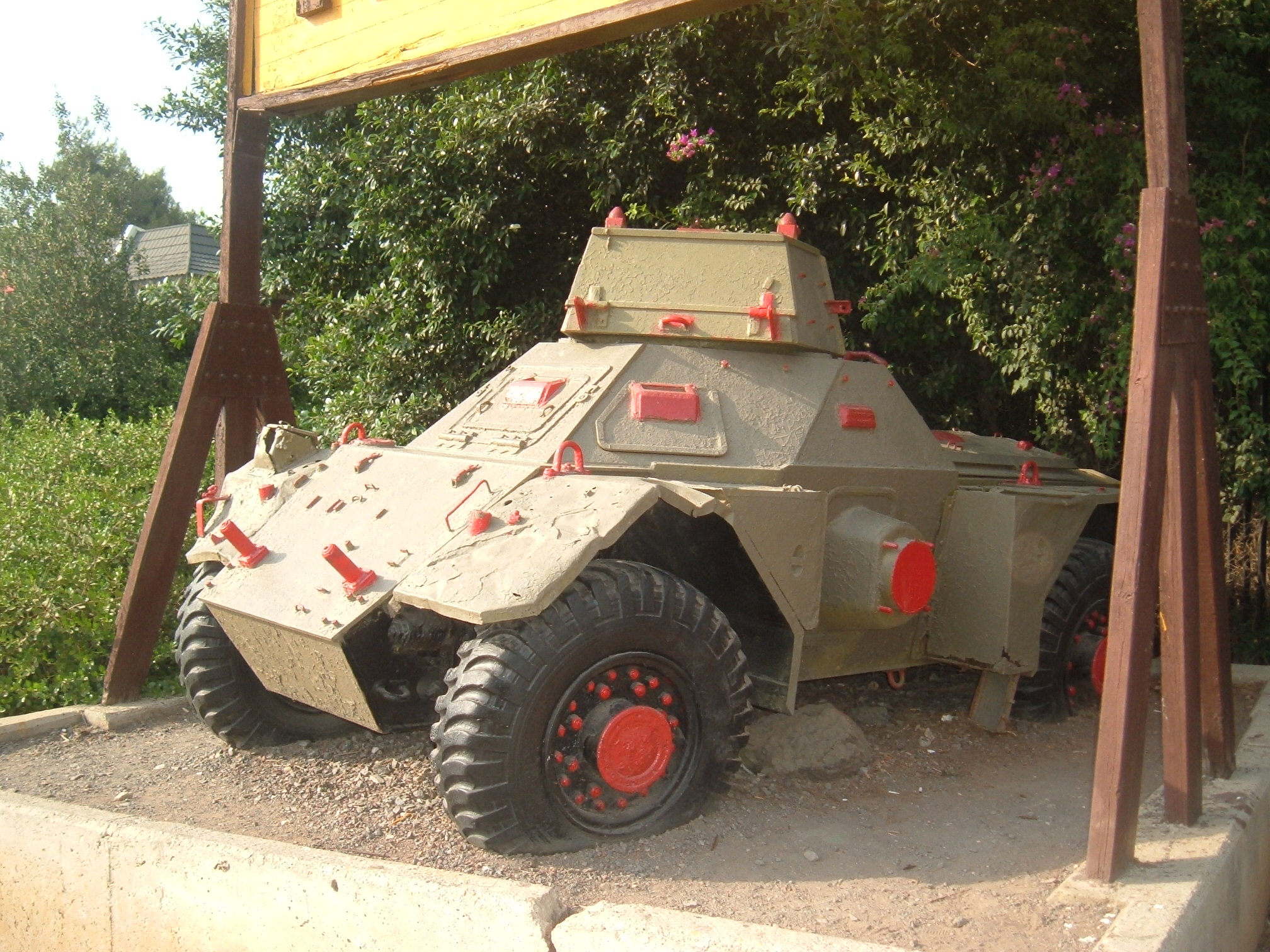 ferret scout mk2 armoured car in Golani brigade museum, Israel. שריונית מסוג פרט סקאוט MK2 המוצגת בכניסה למוזיאון גולני.